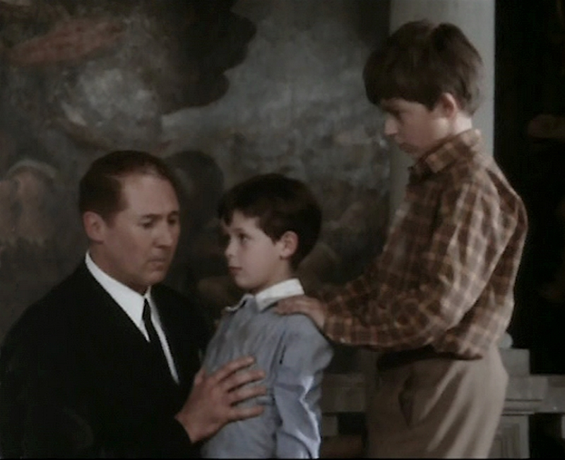 Une scène du film de Lugi Comencini L'Incompris, 1966. Le Consul (Anthony Quayle) avec ses deux enfants.